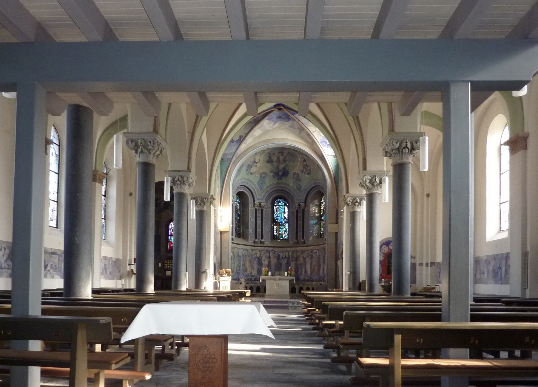 St. Hubertus (Köln-Fittard)